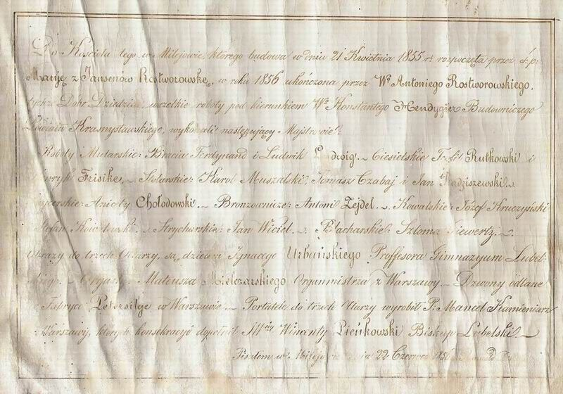 Dokument potwierdzający wykonanie prac nad nowo wybudowanym kościołem w Milejowie.